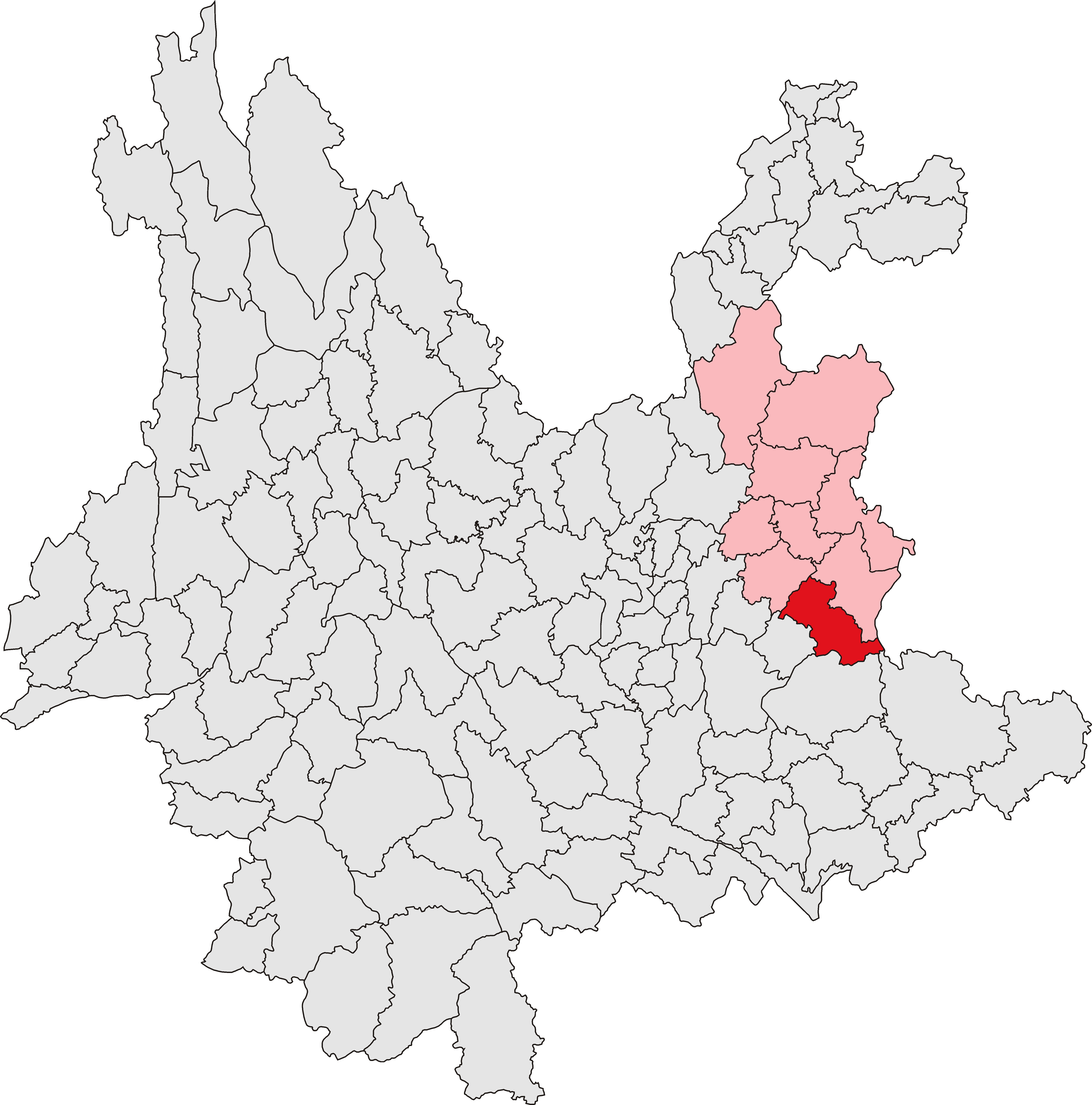 中文（中国大陆）: 师宗县位置图